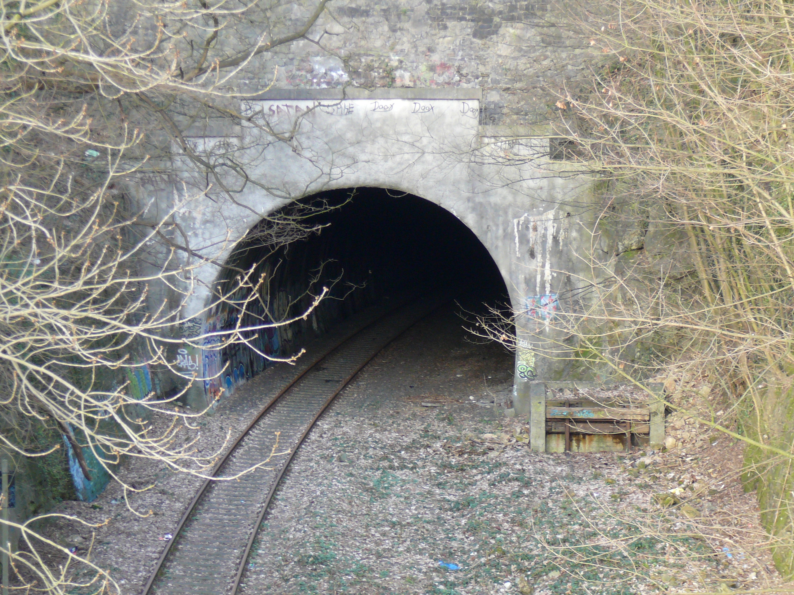 Briller Str, Wuppertal